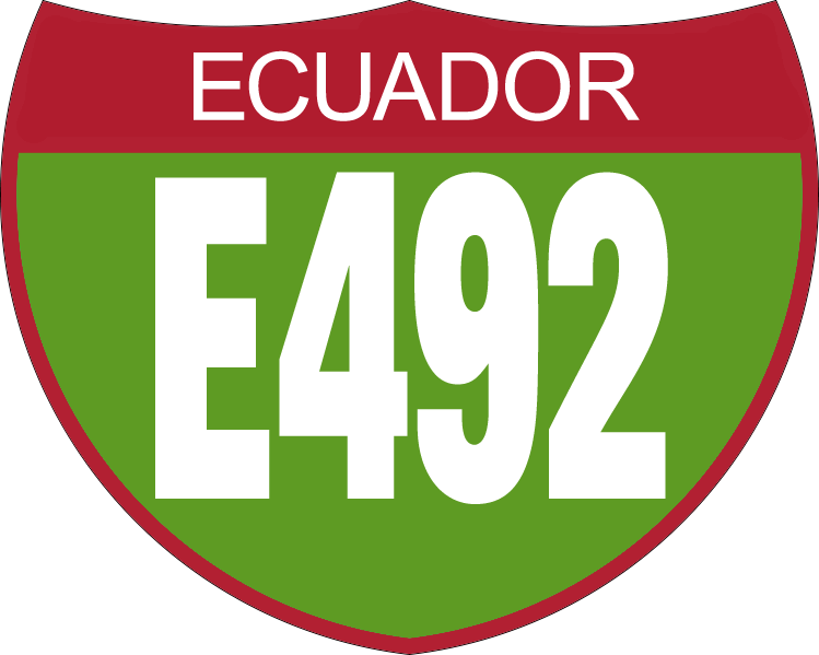 Disco de Identificación Ruta E492